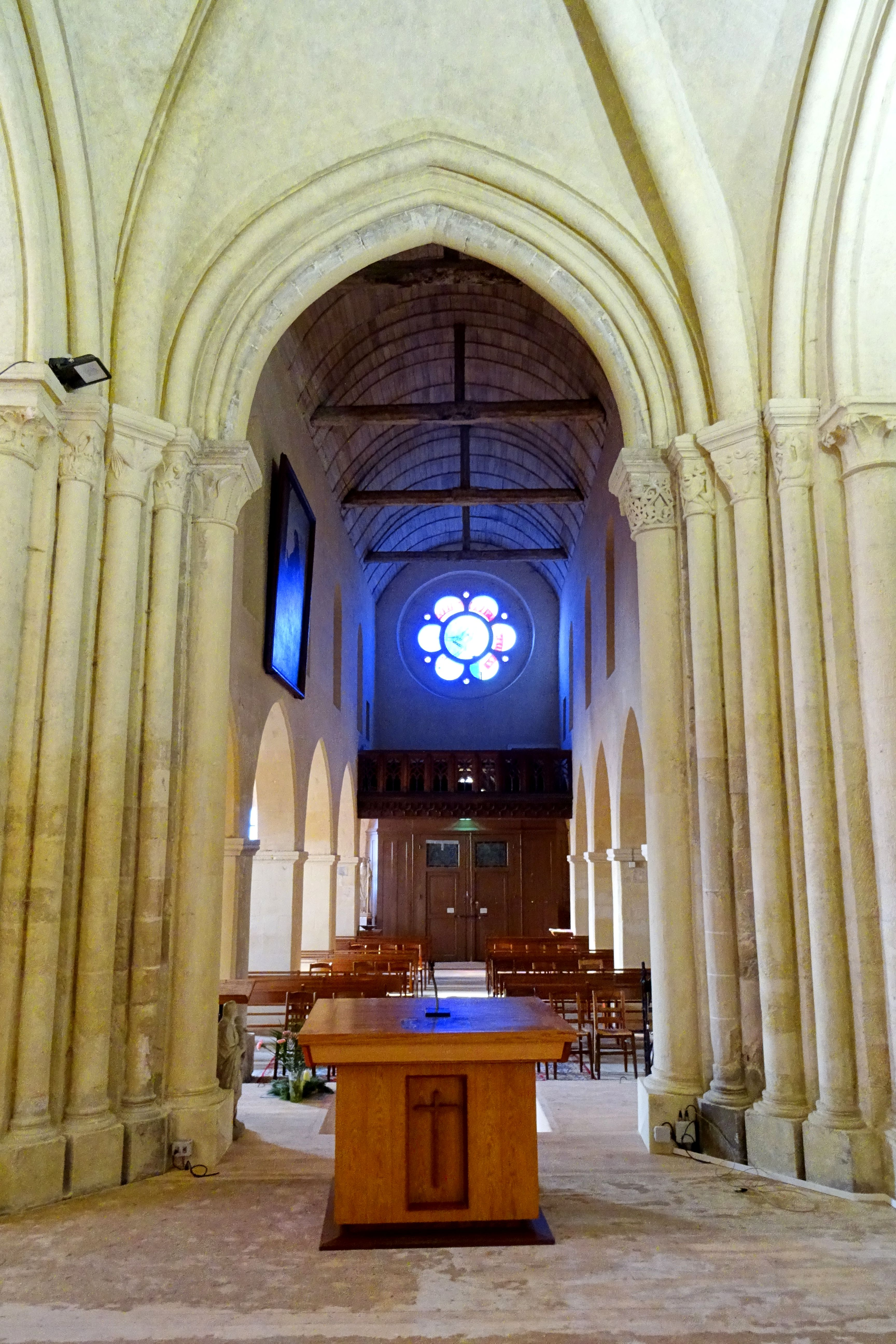 Intérieur de l'église - voir le titre du fichier.